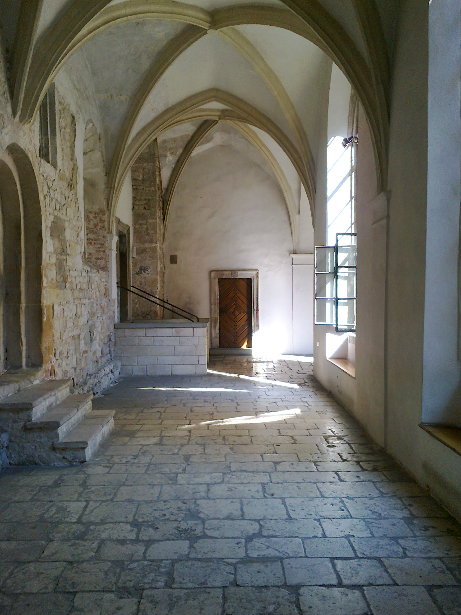 KruzgankiTyniec